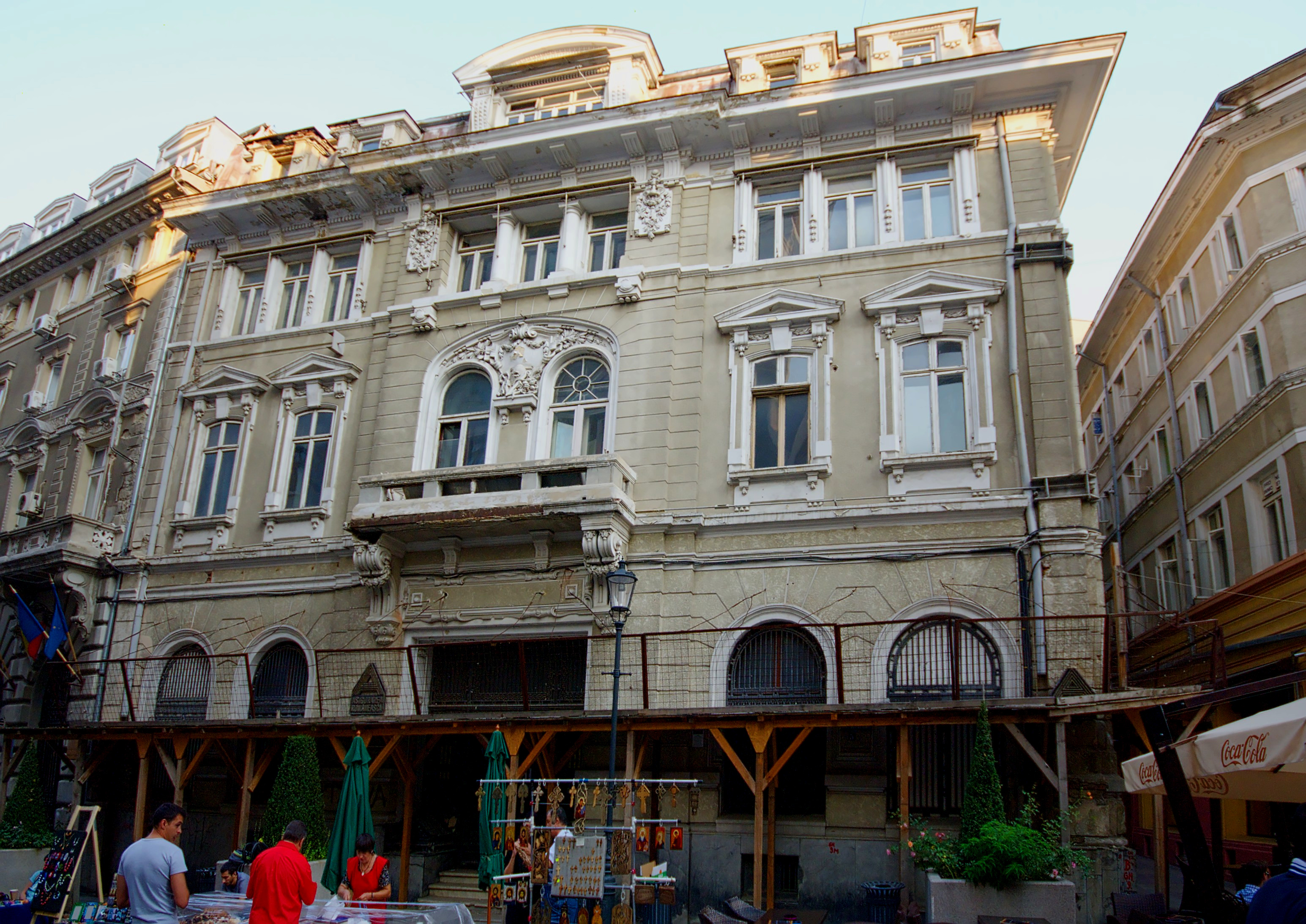 Biblioteca Finanțe Credit, Smârdan 5